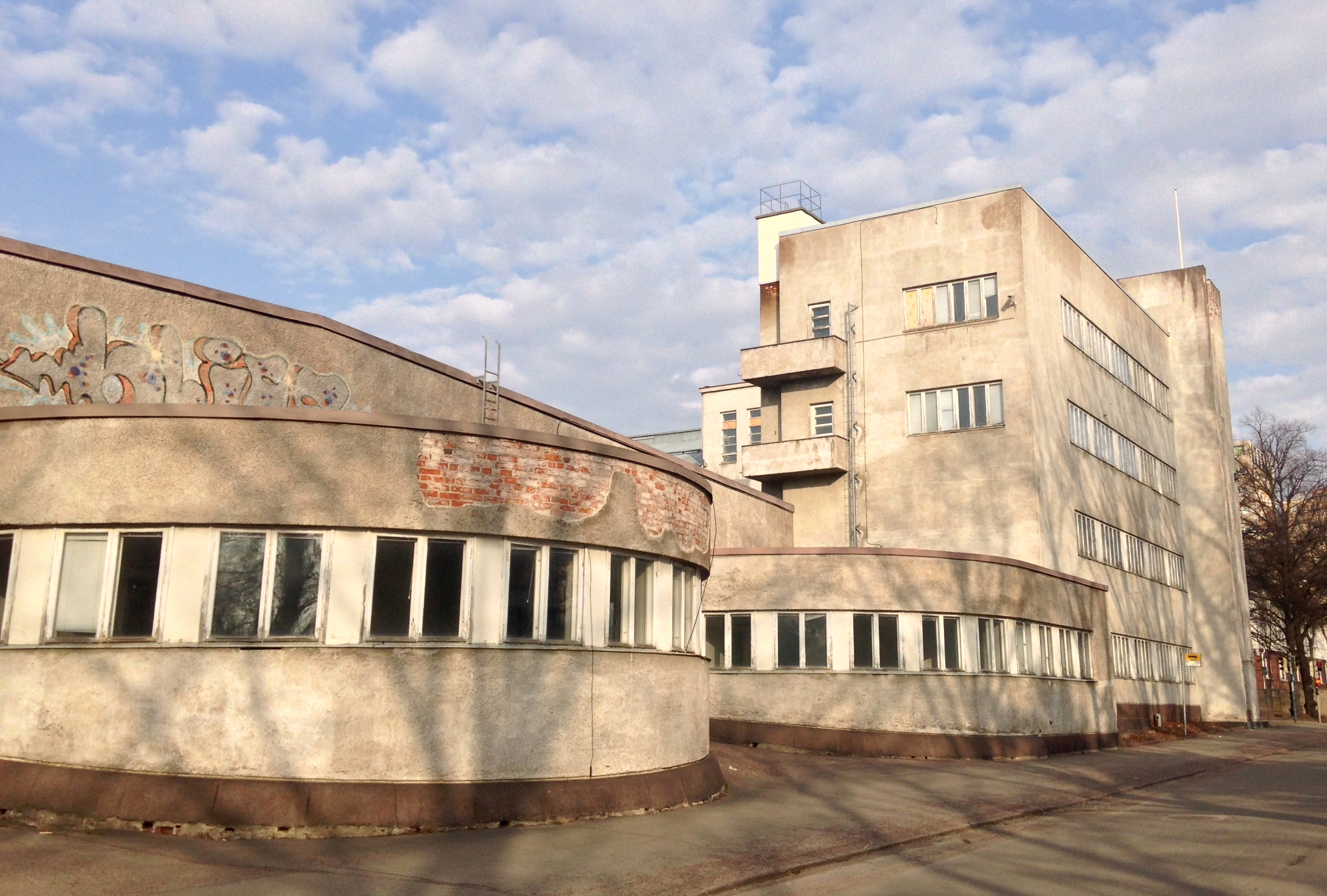 Taivallahden kasarmit, Pohjoisen Hesperiankadun puoli